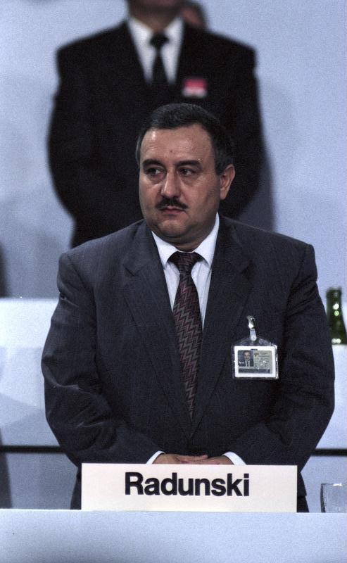 11.-13.9.1989 37. Bundesparteitag der CDU in der Bremer Stadthalle.